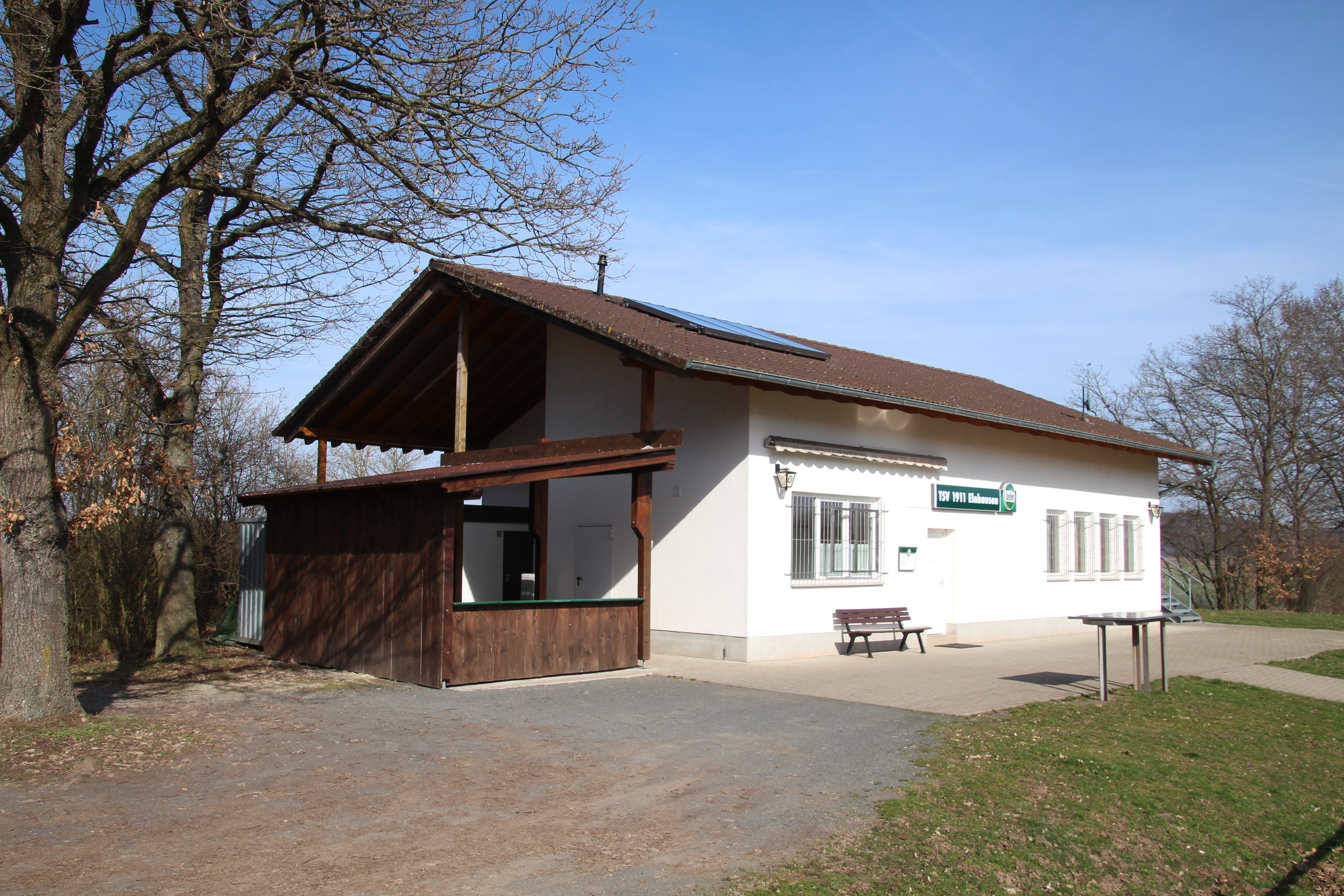 Siehe Bild und Dateiname